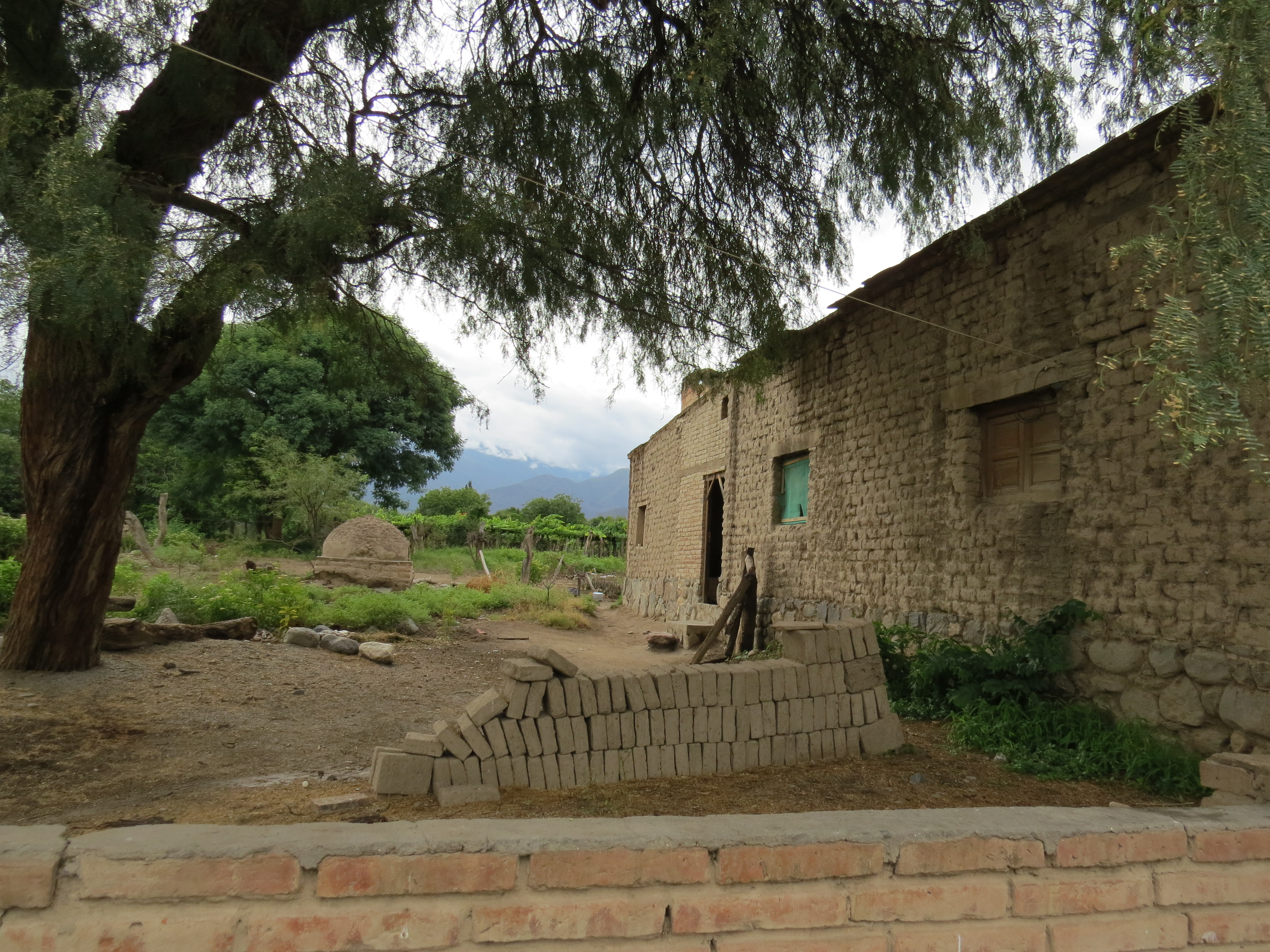 Colalao del Valle, Provincia de Tucumán.